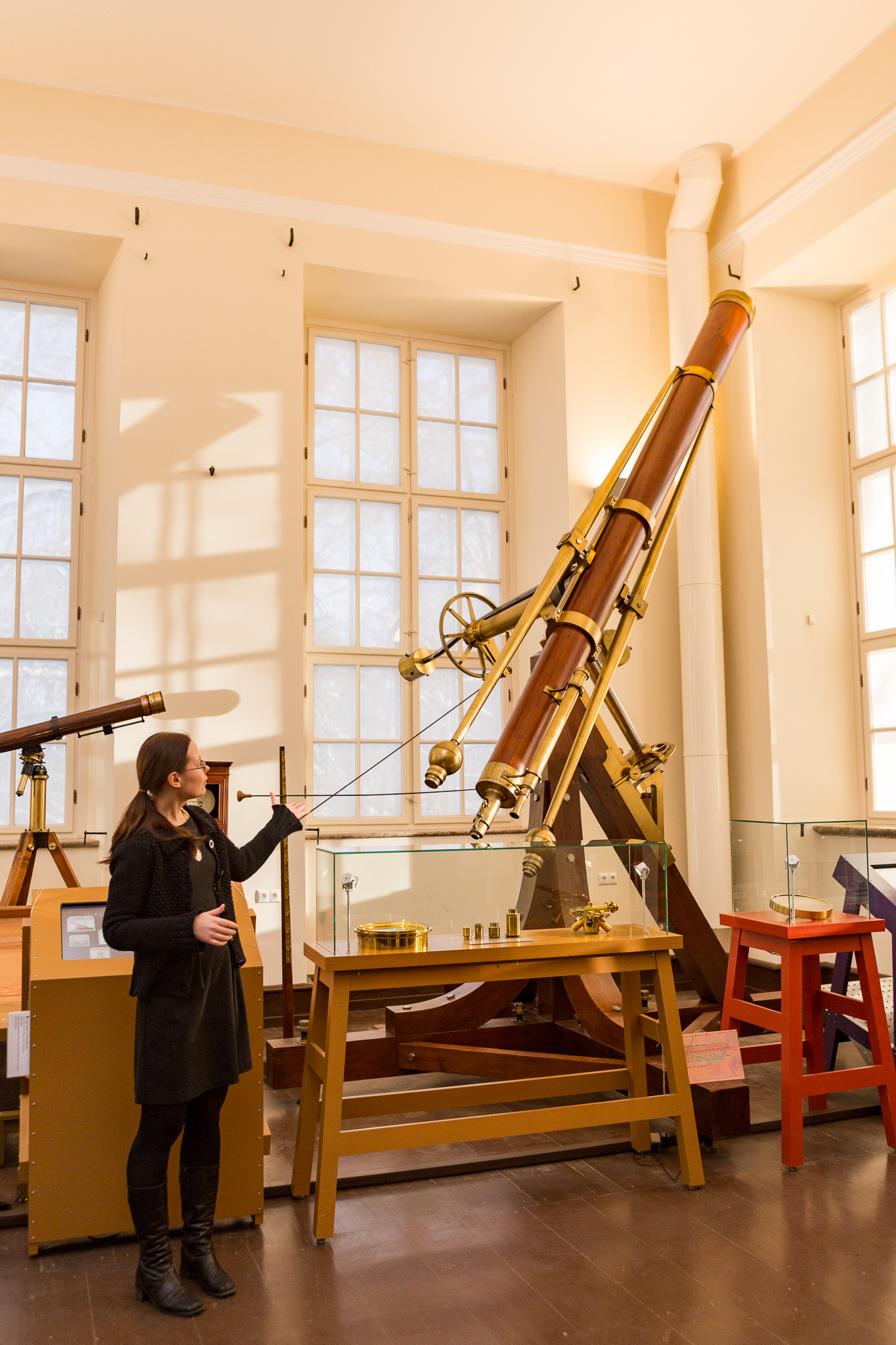 Teadusfoto 2015 lõpetamine. Tartu Tähetorni juhataja Janet Laidla.